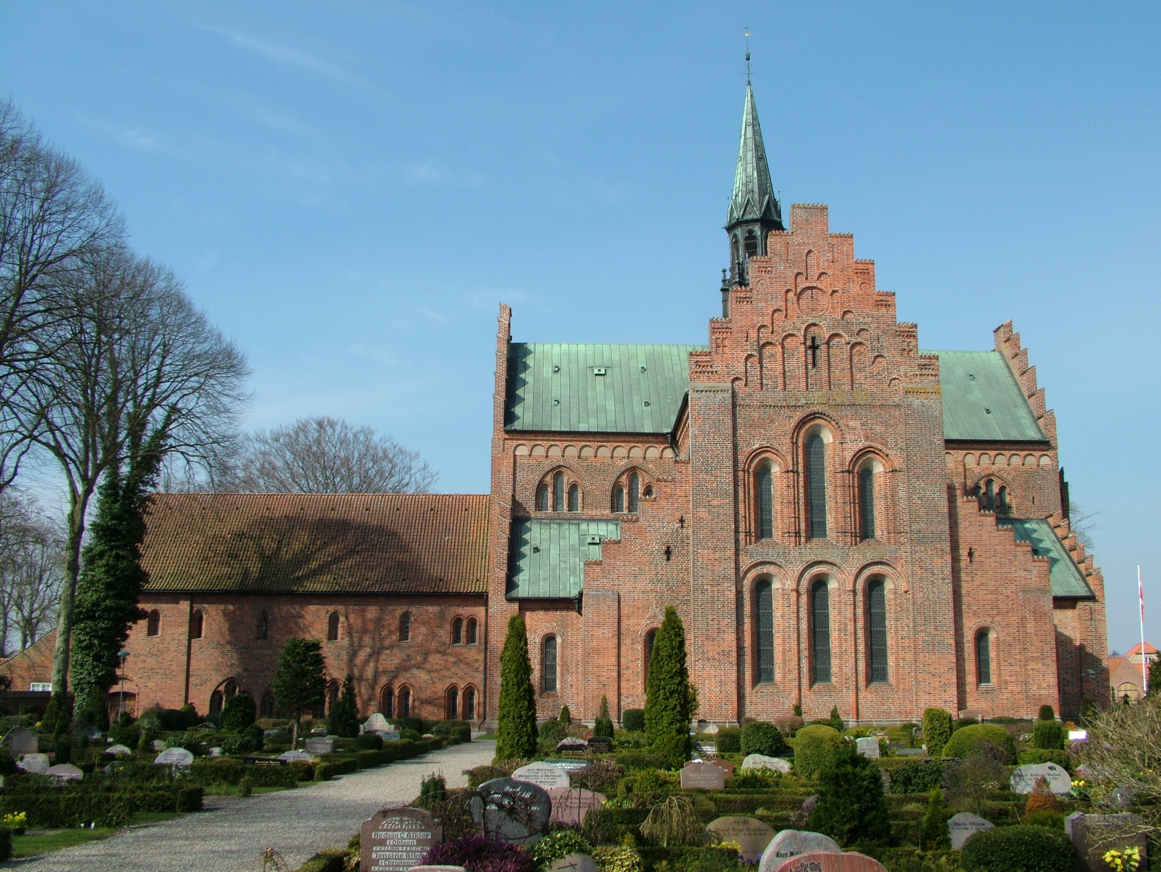 Løgumkloster, Denmark, die Kirche des Klosters